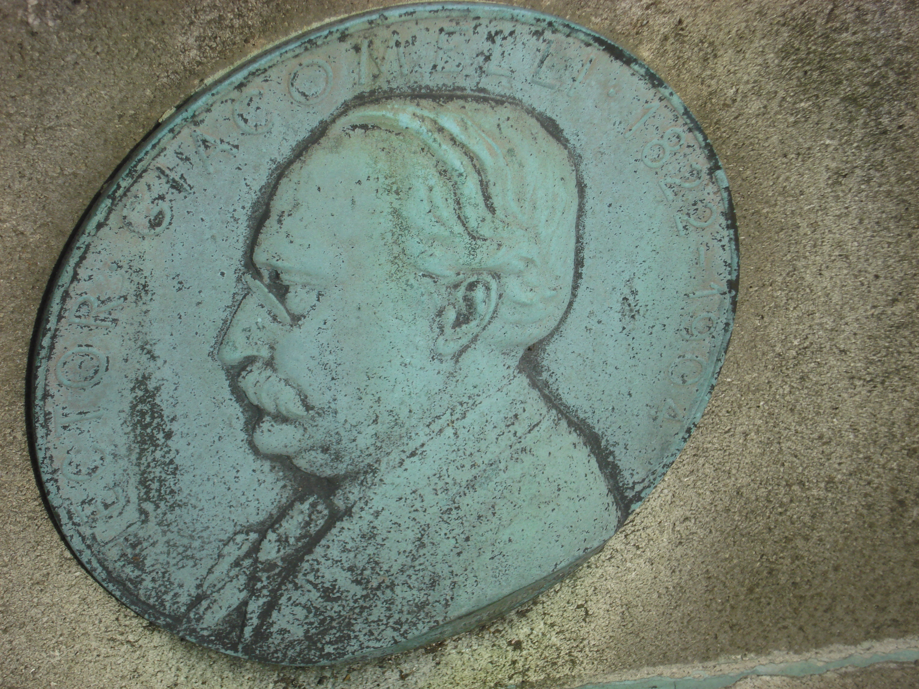 GIACOMELLI Hector, (1822-1904), artiste peintre, aquarelliste, graveur, illustrateur, connu surtout pour ses peintures d'oiseaux. Né à Paris d'un père italien, professeur de chant, il est d'abord graveur avant de devenir dessinateur industriel pour l'orfèvrerie et les bijoux. Vers l'âge de trente ans, une maladie grave le force à s'éloigner de Paris. Il se met alors à dessiner et à peindre les plantes, les insectes et les oiseaux autour de sa maison de campagne. Il est né le 1er avril 1822 à Paris, décédé le 1er décembre 1904 à Menton. Il est le fils de Joseph-Marie-Juvenal Giacomelli, maître de chapelle, et d’Annette Rebours. Il épouse Adèle Popelin, (1821-1895). La tombe est dans la 32e division, 3e ligne, n° 63, chemin Guersant, concession n° 496-1854